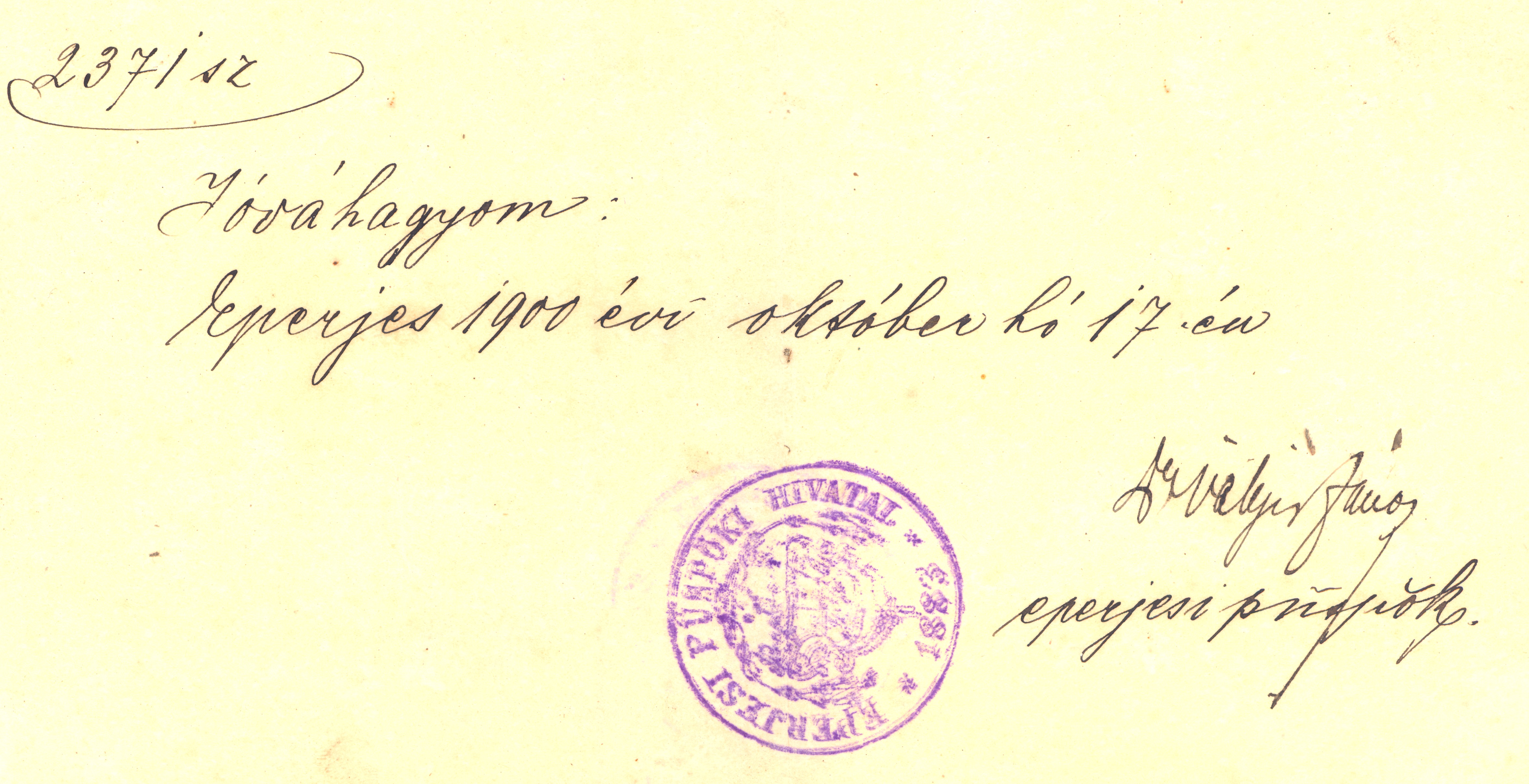 Podpis a pečiatka biskupa Jána Vályia z r. 1900